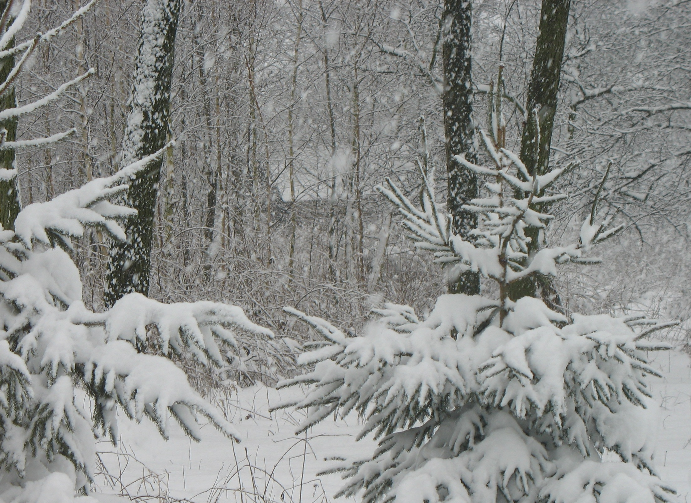 Las zimą z chatką w tle